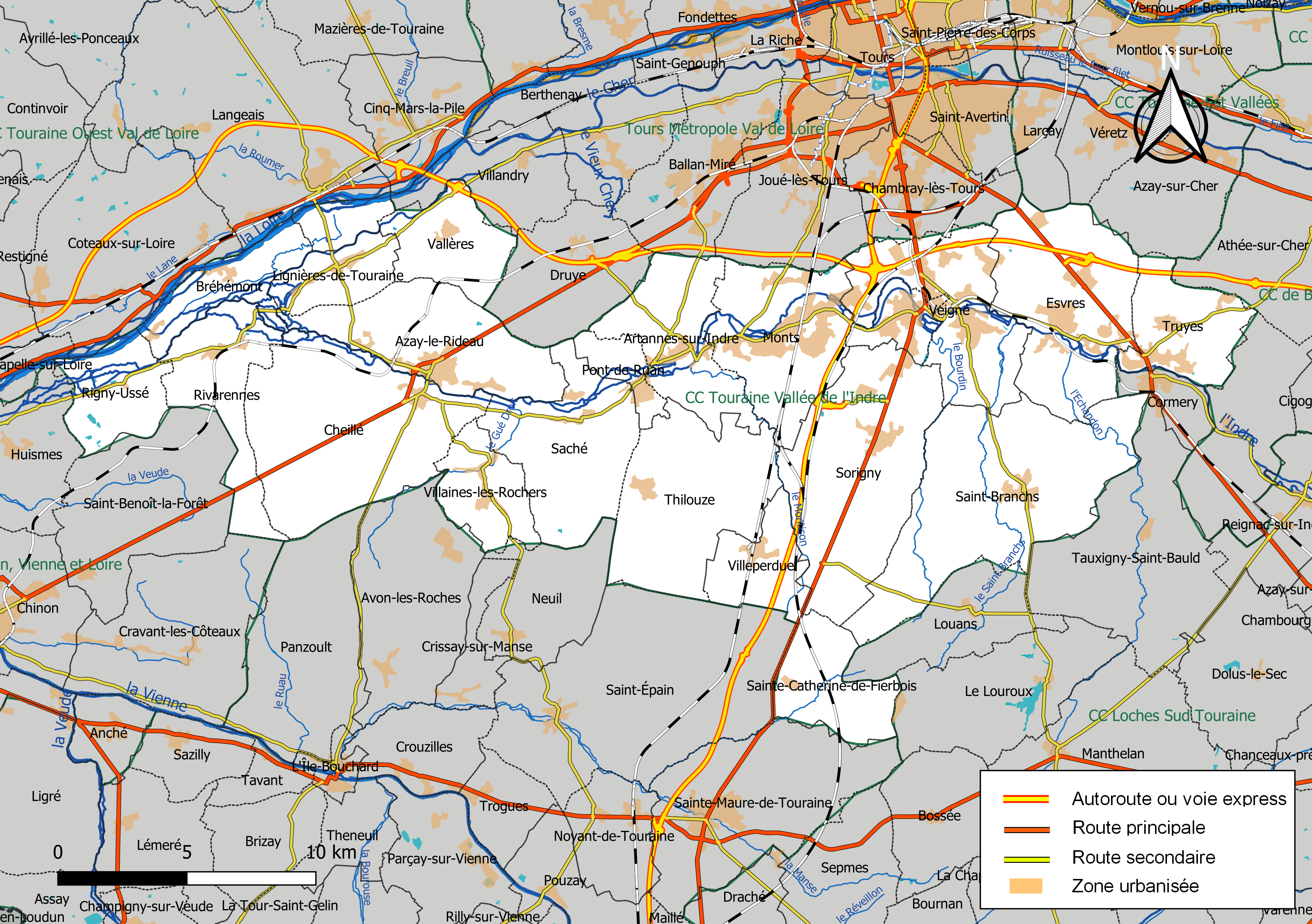 Carte de la communauté de communes Touraine Vallée de l'Indre, département d'Indre-et-Loire, France. Composition au 1er janvier 2019.